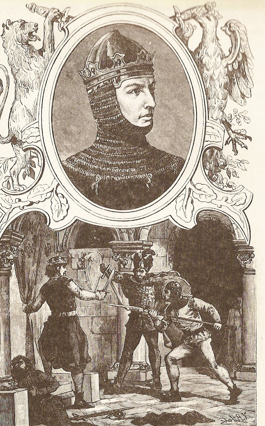 Przemysław II Rycina ks. Pillatiego zamieszczona w książce J.Kraszewskiego, Wizerunki książąt i królów polskich, Warszawa 1888, s. 114.